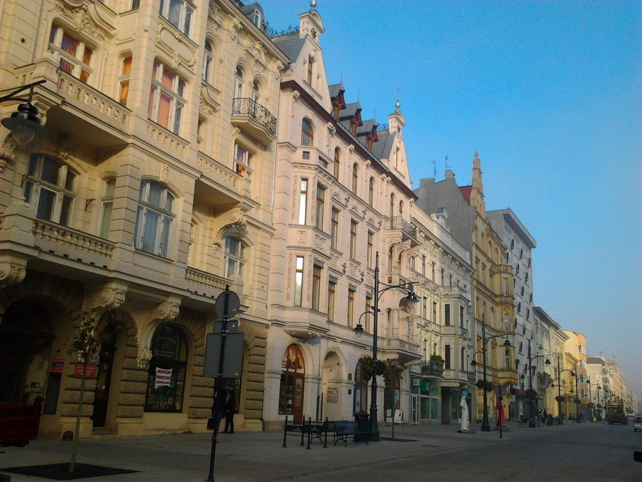 Ul Piotrkowska w Łodzi w porannej mgle